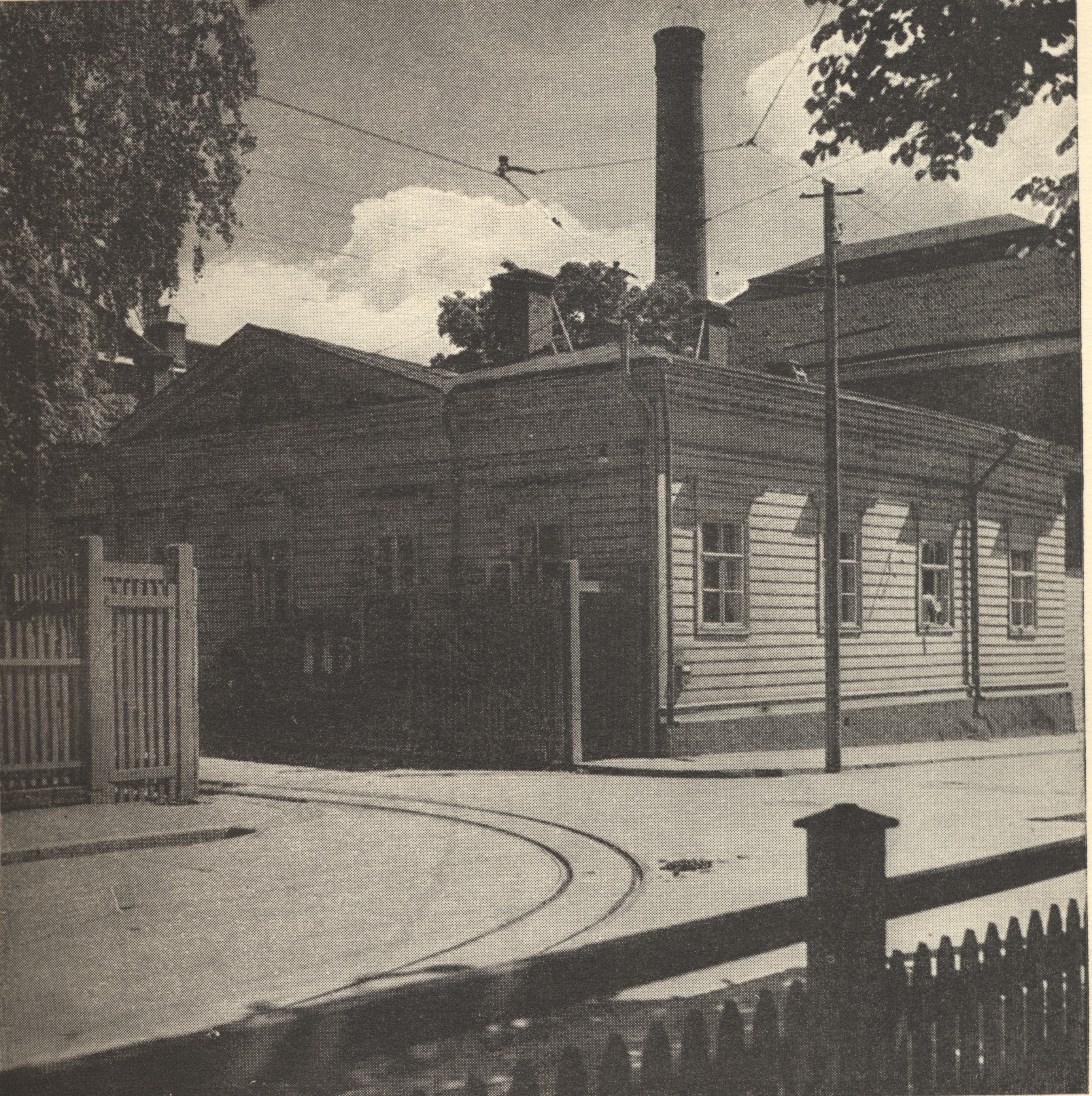 Mamselin koulu